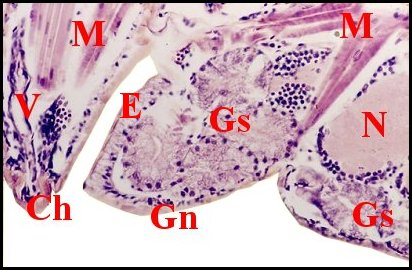 Glandes gnathocoxales en coupe parasagittale du prosoma de Moebellia penicillata mâle